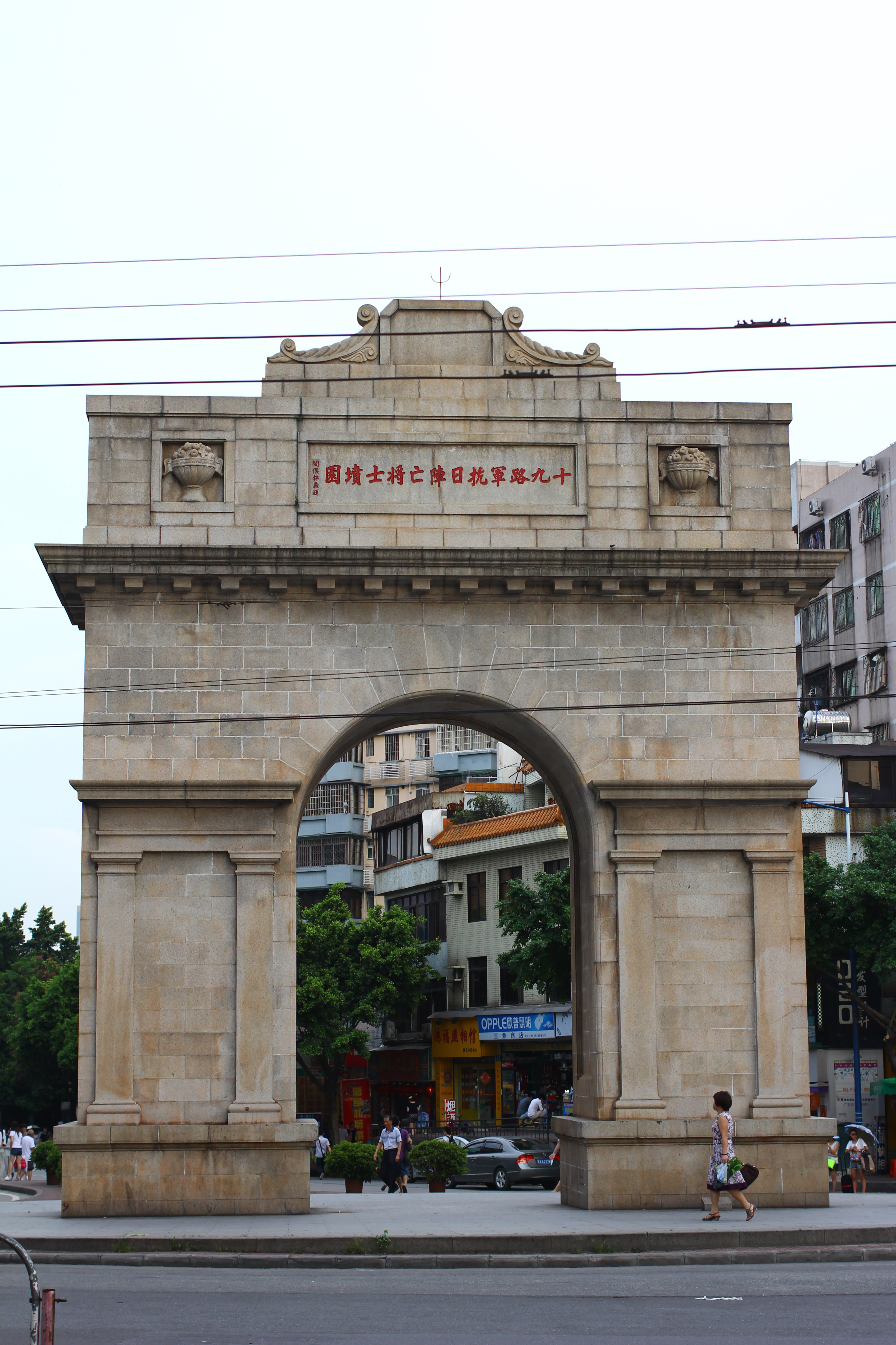 位於廣州市的十九路軍抗日陣亡將士墳園凱旋門正面。閩侯林森題，碑文在文化大革命期間曾被破壞。